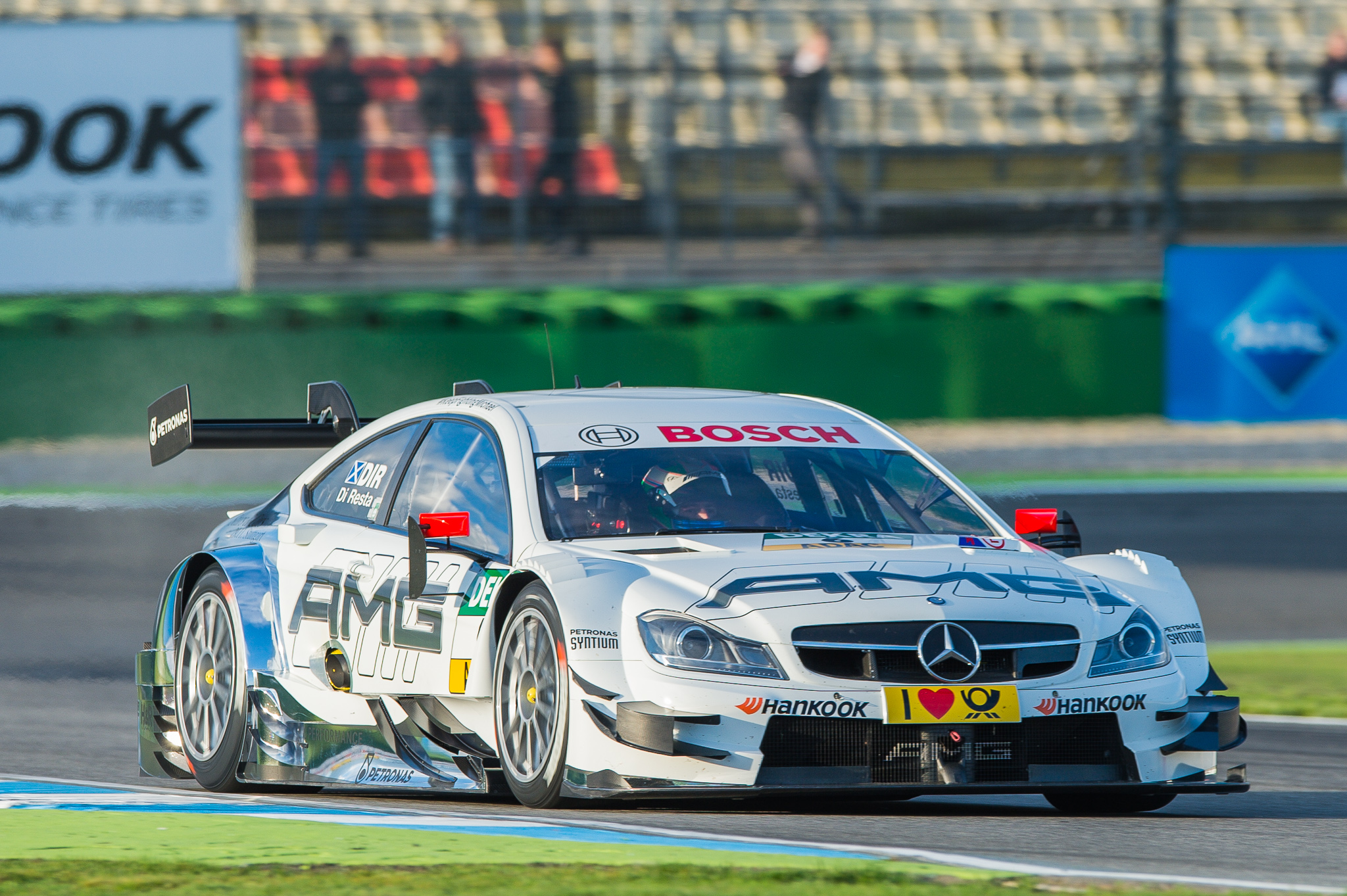 DTM,Deutsche Tourenwagen Masters,HWA AG,Hockenheimring,Mercedes AMG C-Coupe,Motorsport,Paul Di Resta